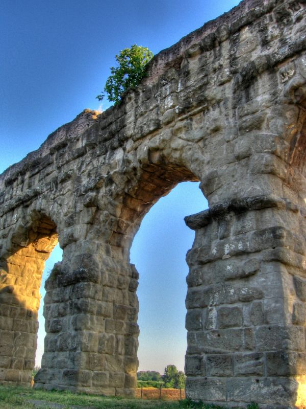 Immagine da Flickr